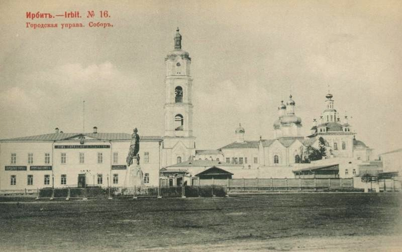 Россия, Пермская губ., г.Ирбит. Городская управа, Собор Богоявления Господня и памятник Екатерине II на Екатерининской пл. 1903г.